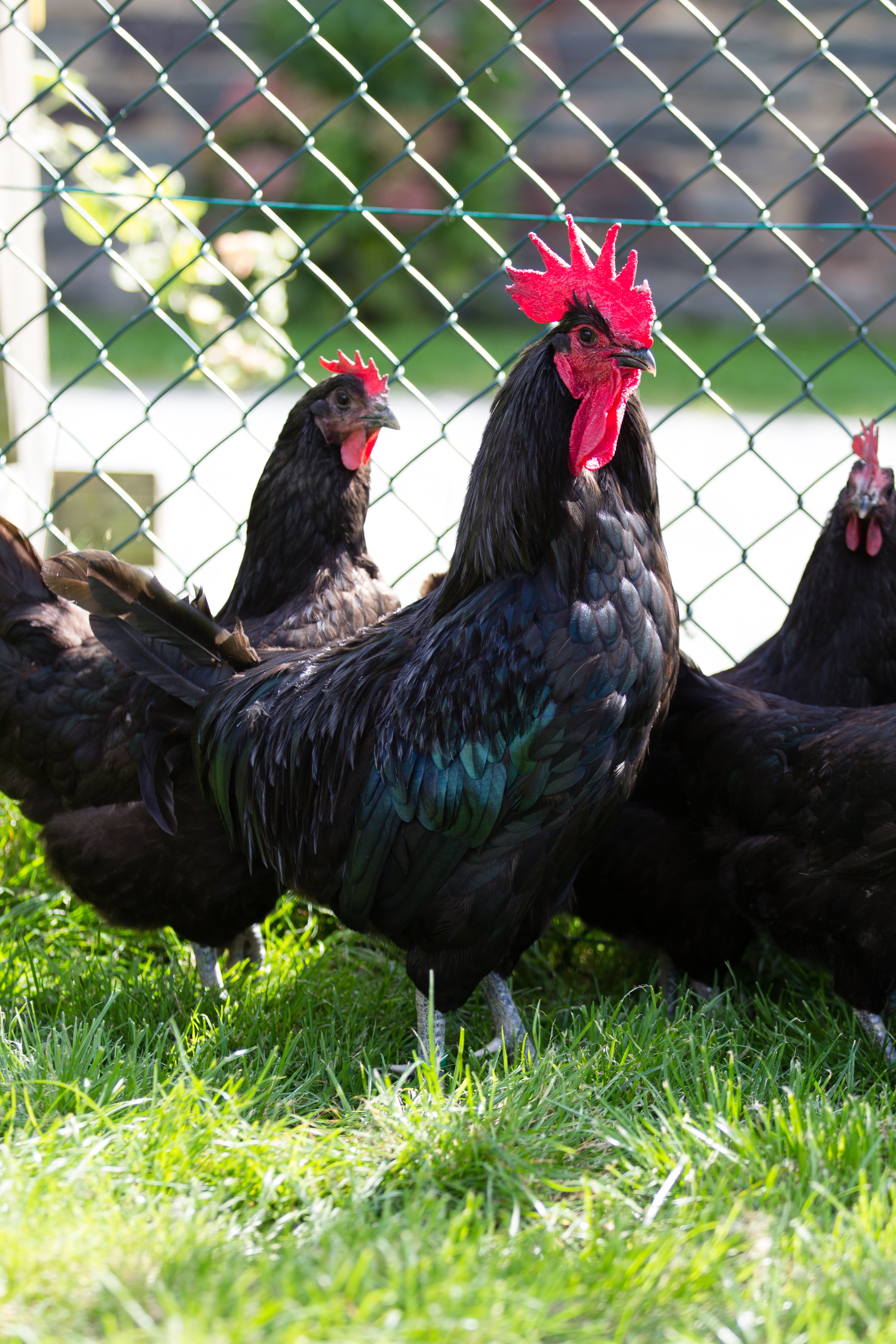 Coq de Janzé à l'Écomusée du pays de Rennes.